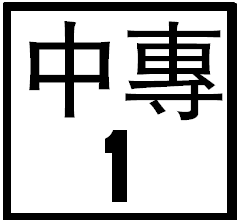 中專1線標誌